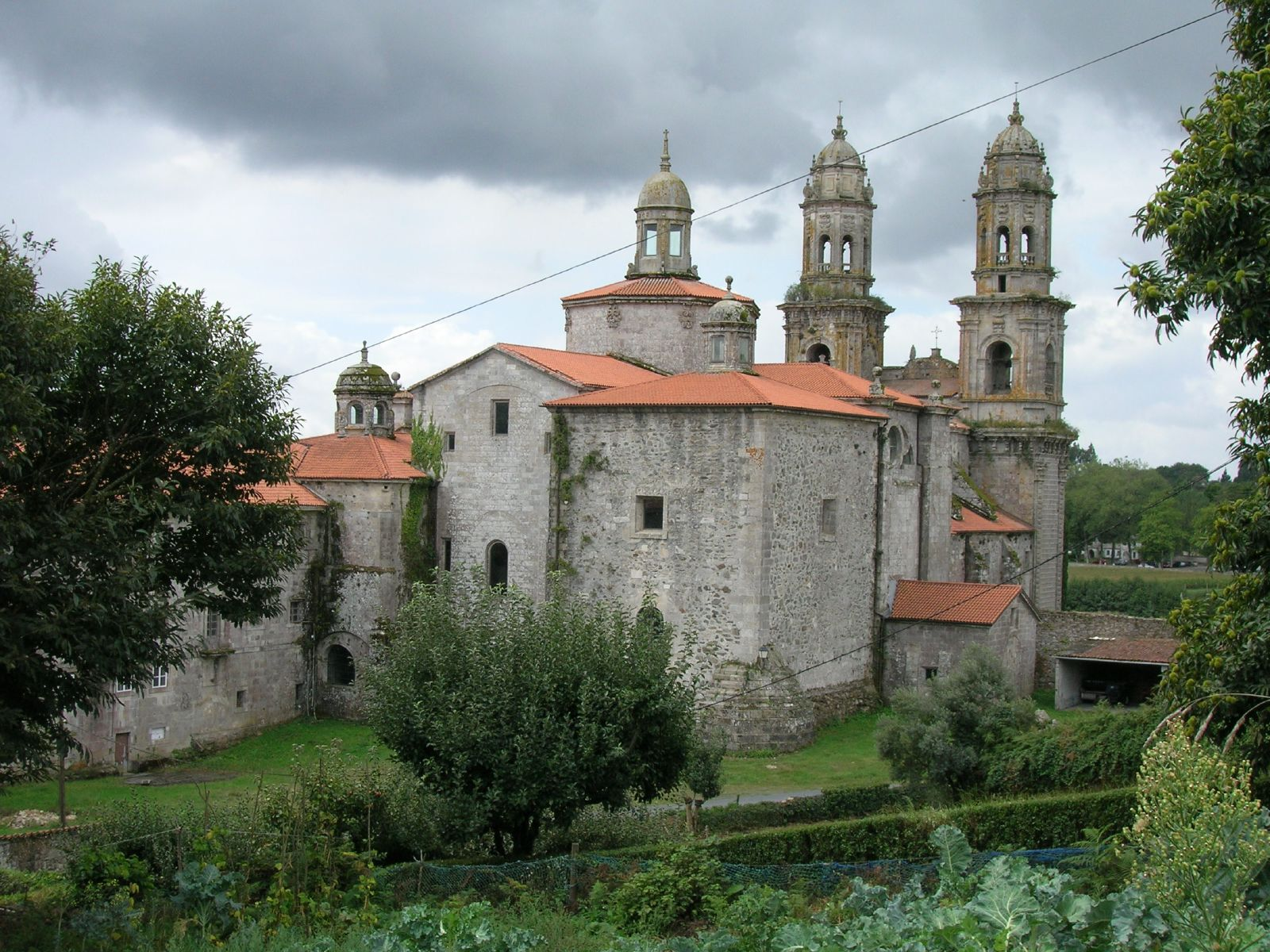 Al fin llegamos.